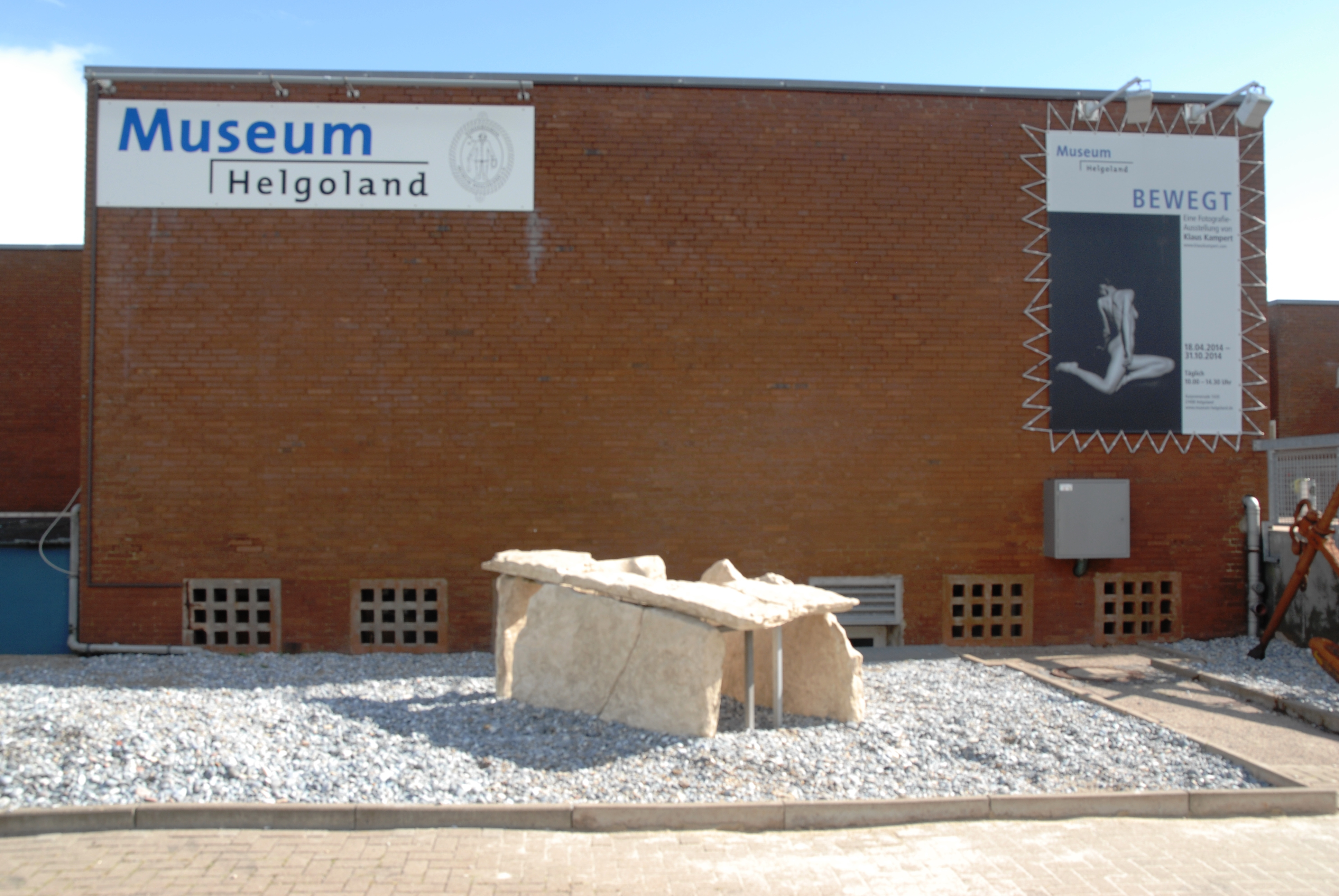 Replik der Steinkiste von Helgoland vor dem Museum Helgoland. Das Original befindet sich im Neuen Museum in Berlin